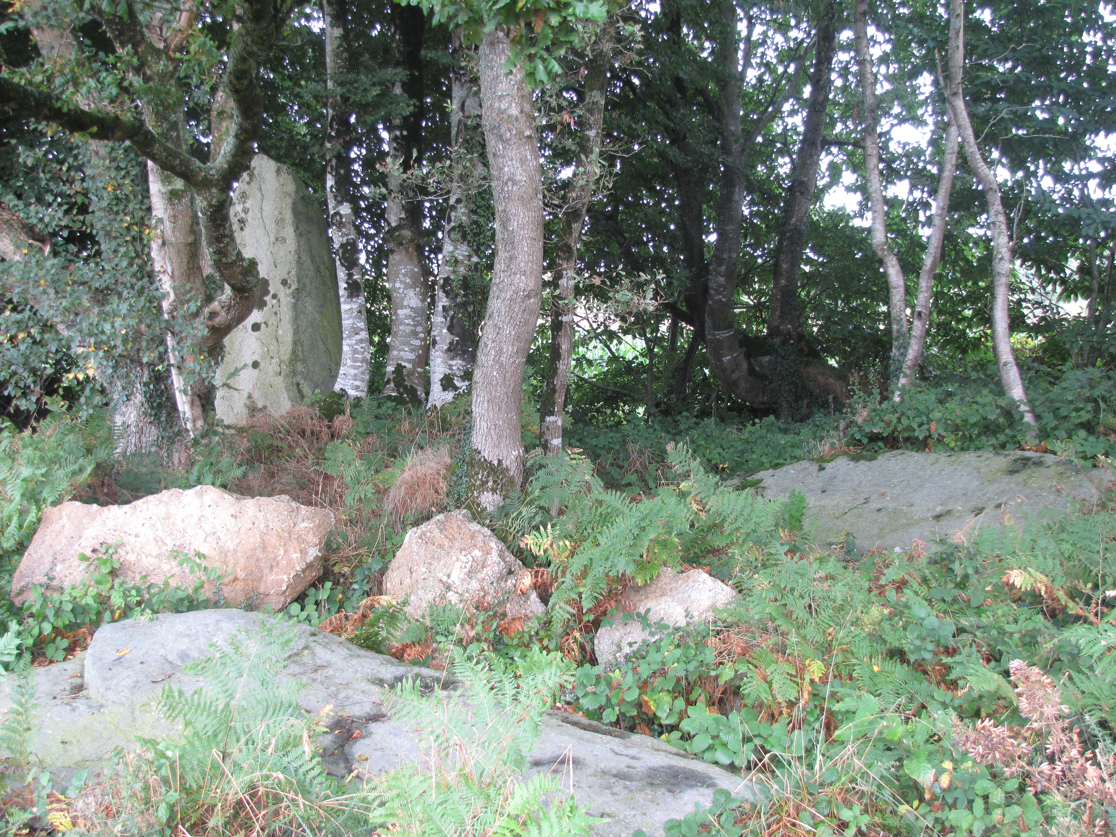 Ce menhir fait à l'origine partie d'un alignement de 3 rochers détruit en 1967. Aujourd'hui 2 rochers sont au sol, dont un avec des inscriptions. .